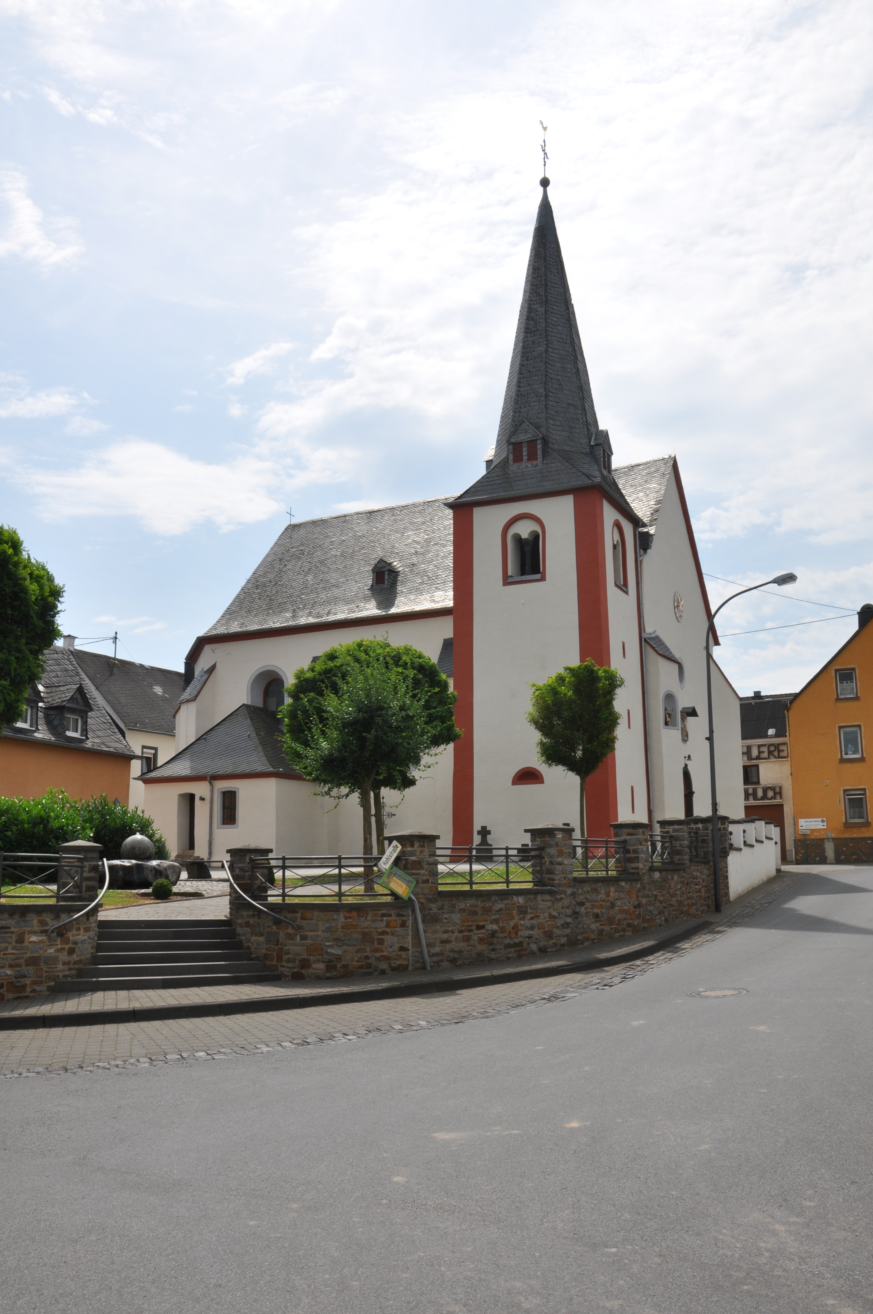 Brohl (Landkreis Cochem-Zell), St. Nikolaus